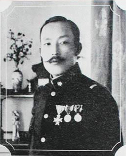 박중양, 1933년 03월 01일 촬영 사진